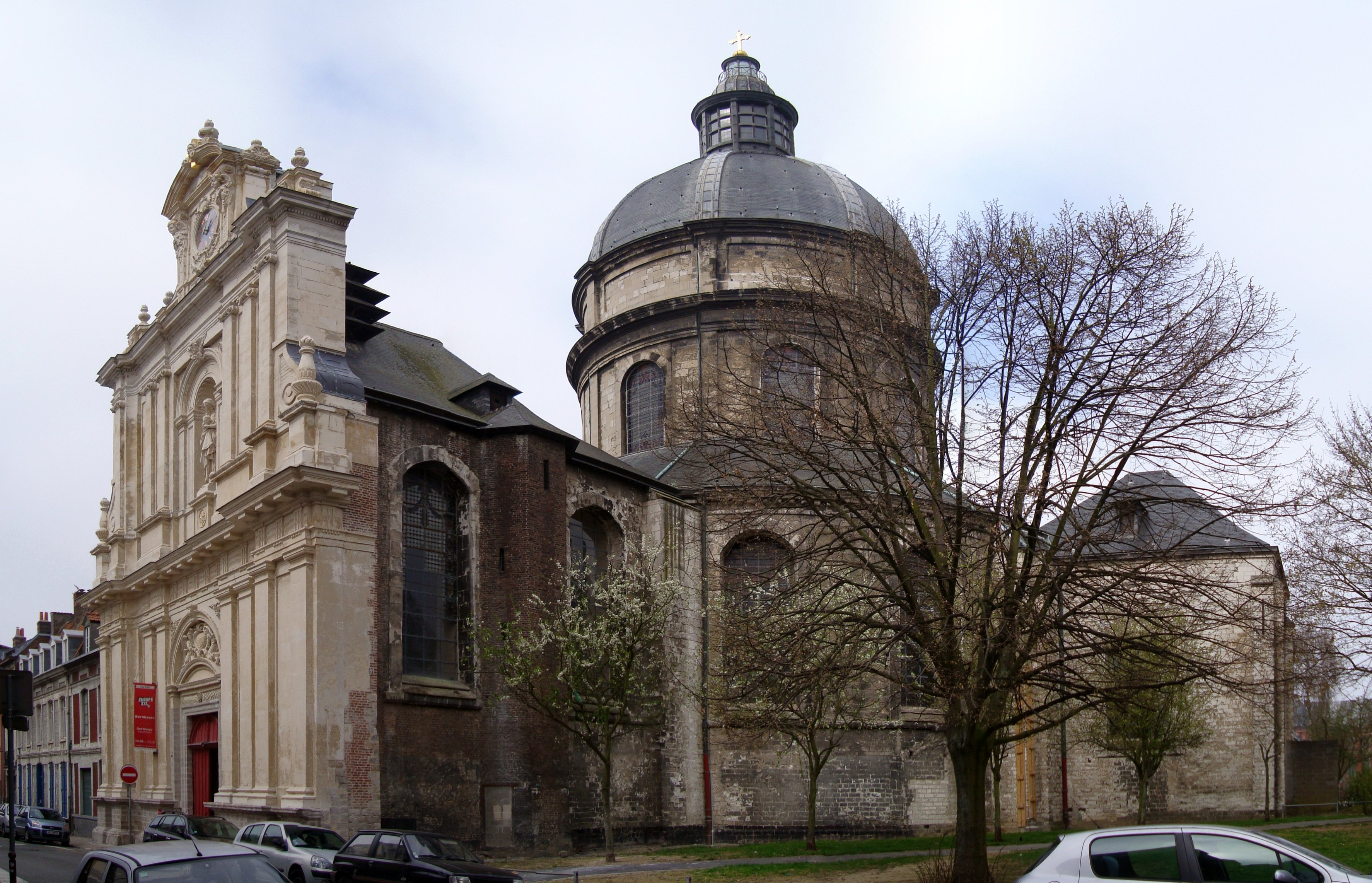 L'église Sainte-Marie-Madeleine de Lille (Nord), désaffectée au culte et transformée en lieu d'expositions.